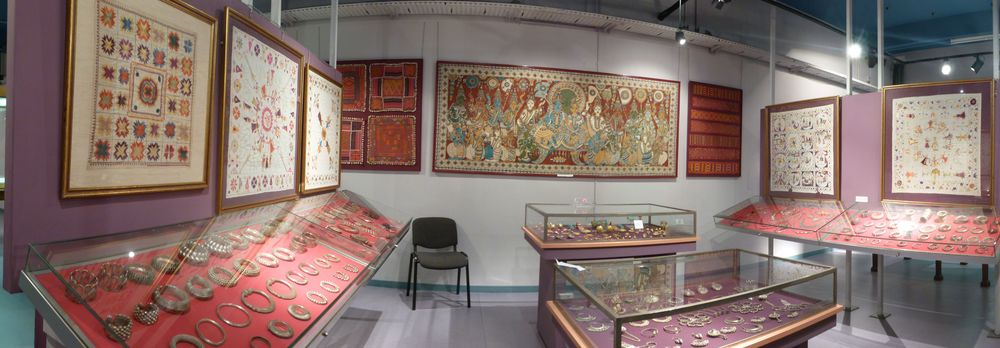 Bijoux, Musée Asiatica